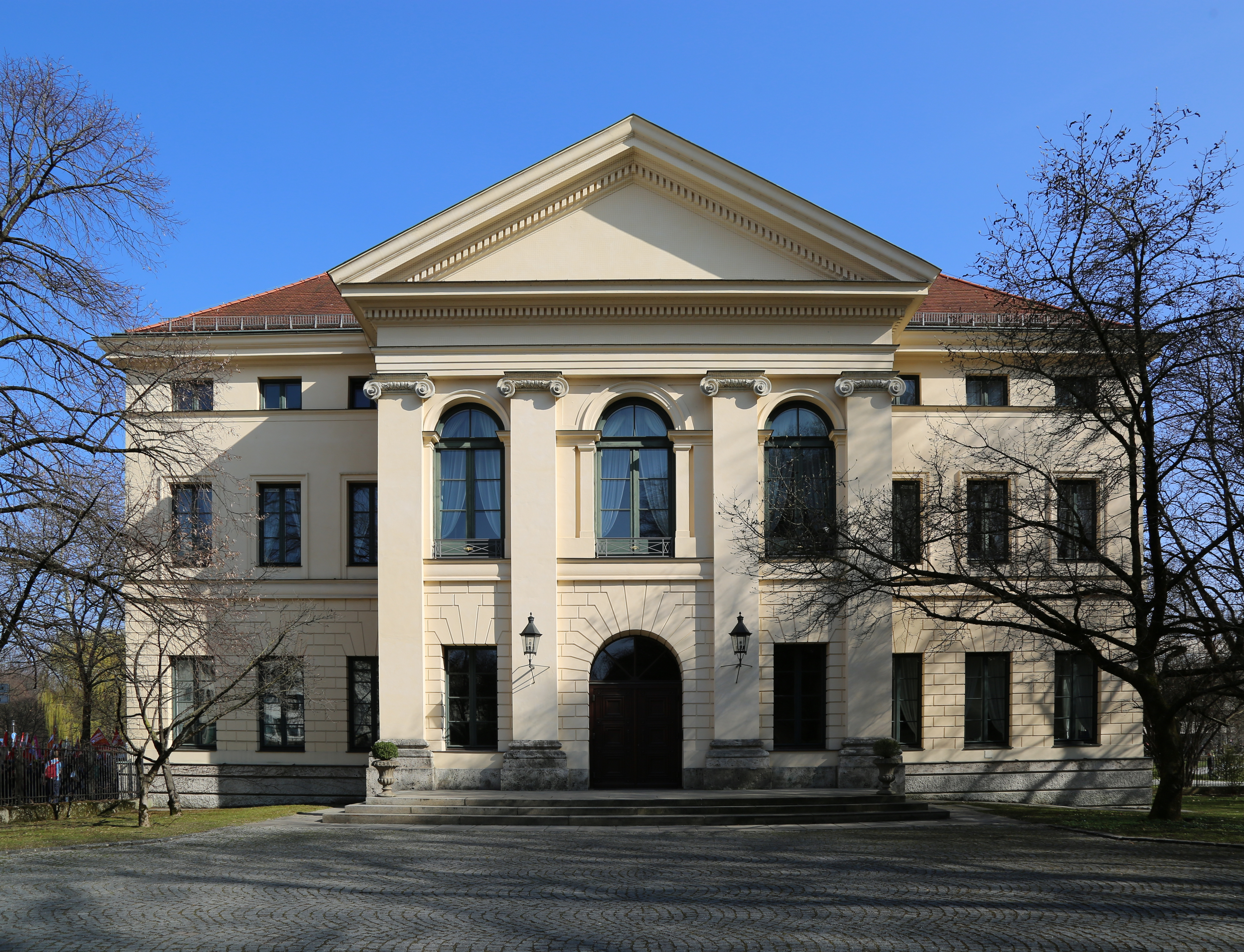 Gartenfassade des Prinz-Carl-Palais in München